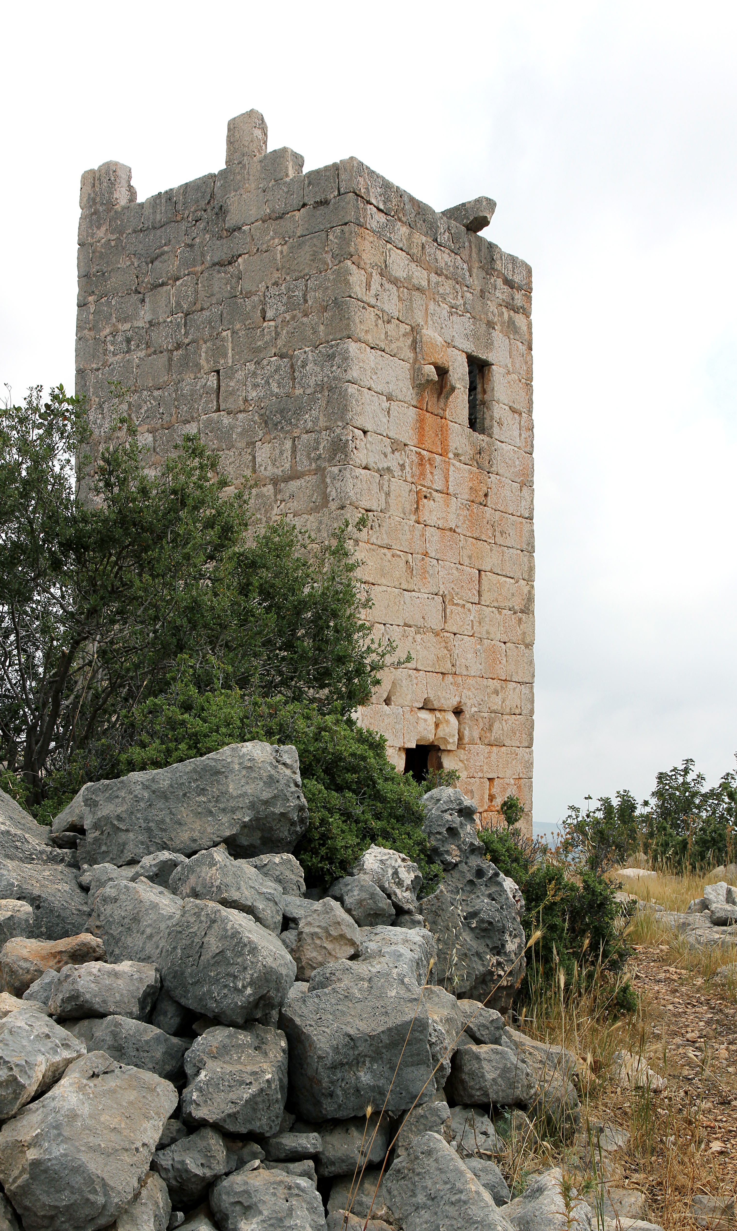 Kilikischer Turm von Boyan bei Kızkalesi in der Südtürkei, Turm von Südwesten